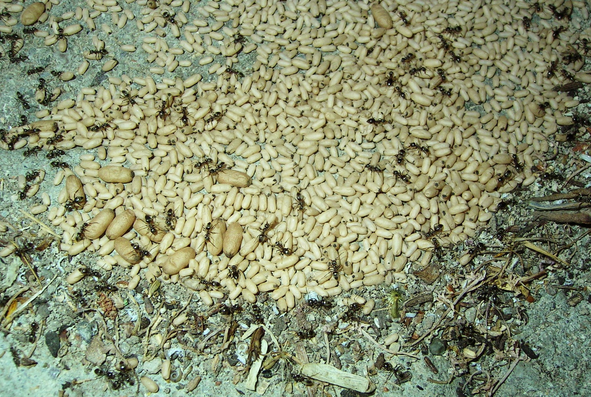 (en) pupa of ants (Formicidae); place: Meiringen, BE; Schweiz; editing: editing with GIMP: cuted and adaptation of brightness and color (de) Puppen der Ameise (Formicidae) Aufnahmeort: Meiringen, BE; Schweiz. Bearbeitung: GIMP Zugeschnitten Helligkeitswert und Farbe angepasst